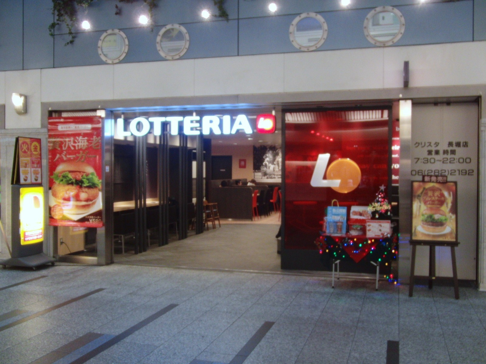 11月29日に改装オープンされたロッテリアクリスタ長堀店を撮影